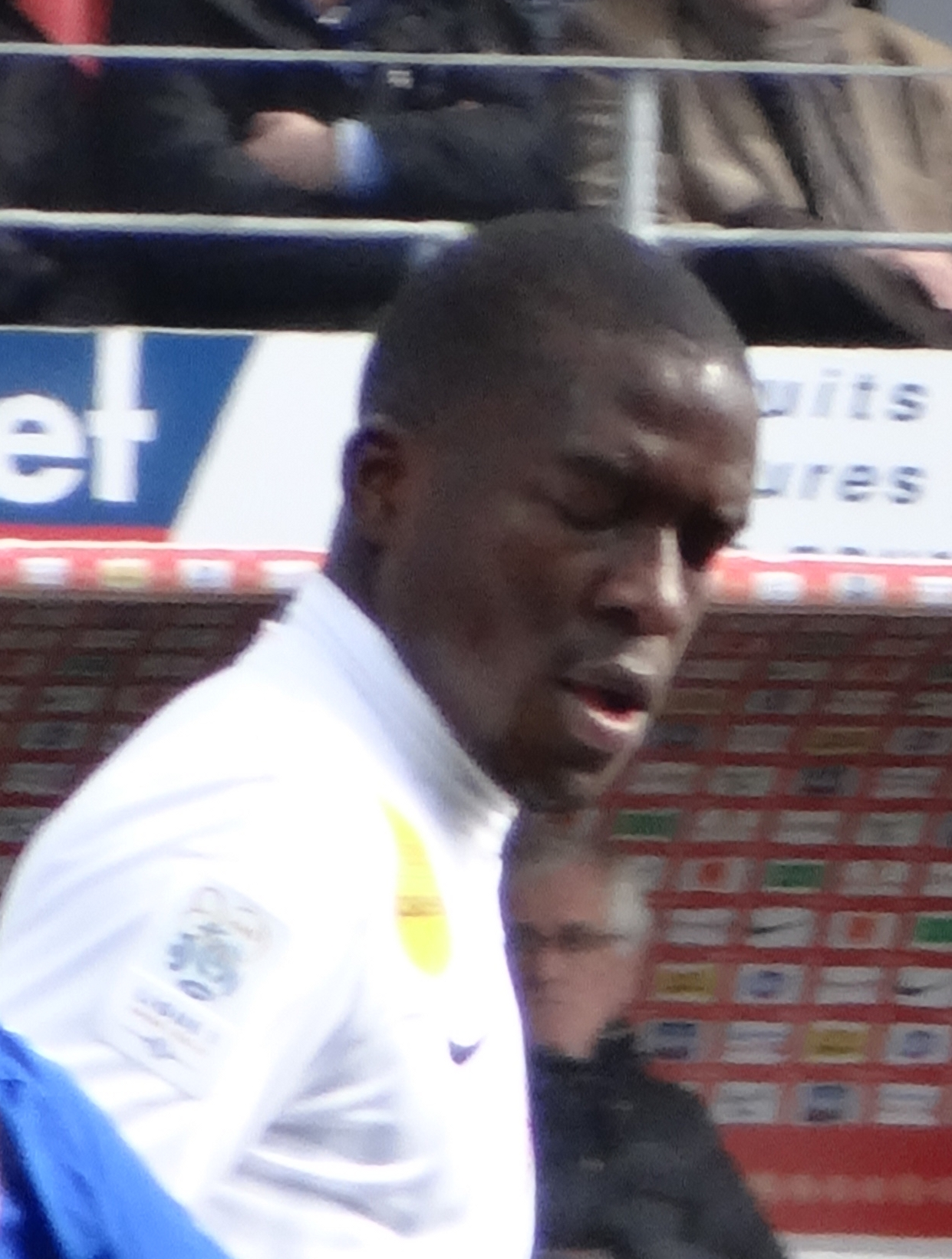 Match de football (Ligue 1) entre le Stade brestois 29 et l'Olympique lyonnais, le 3 mars 2013